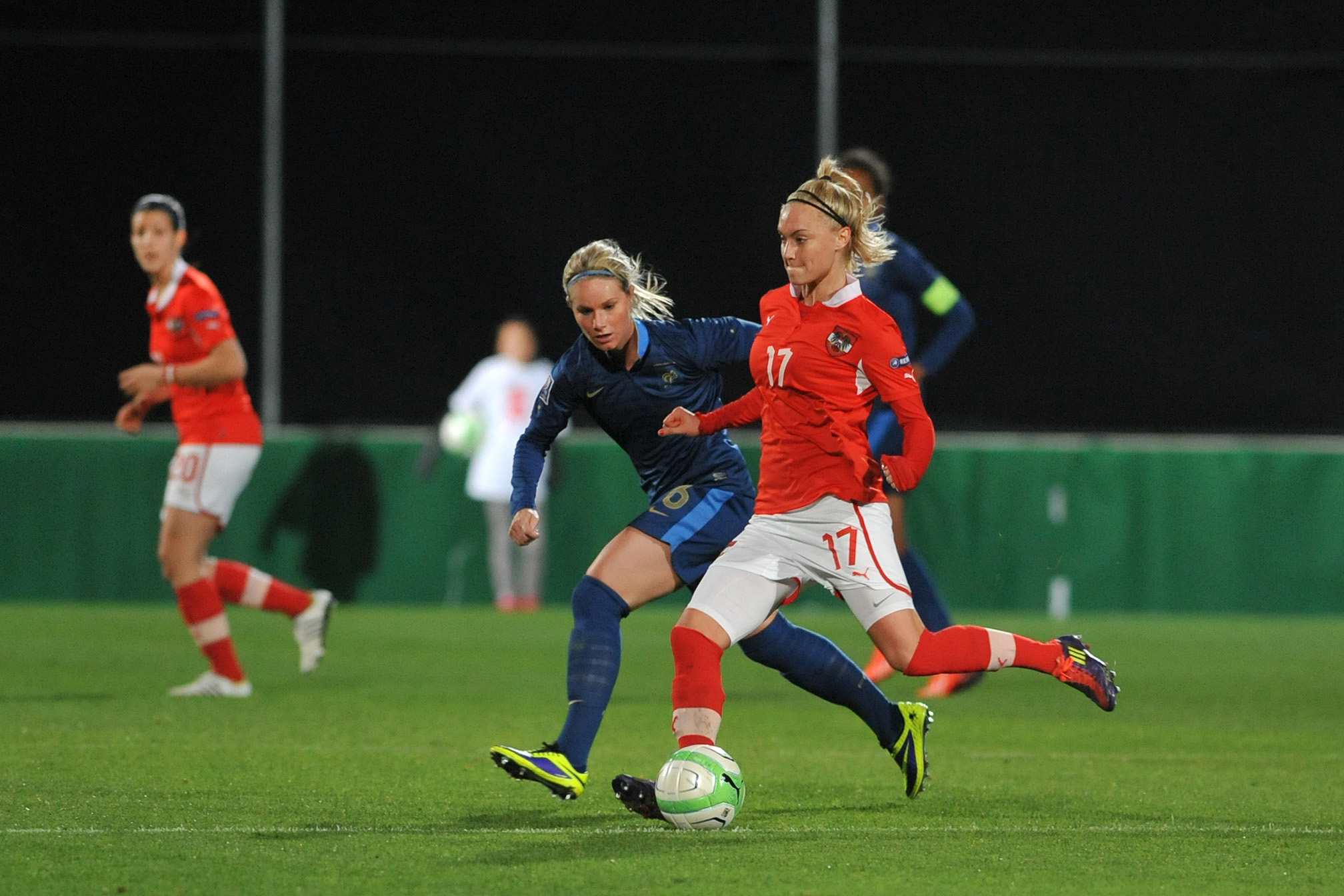 FIFA Women's World Cup 2015 Qualiying Round Österreich - Frankreich am 31. Oktober 2013 in Ritzing: Sarah Puntigam